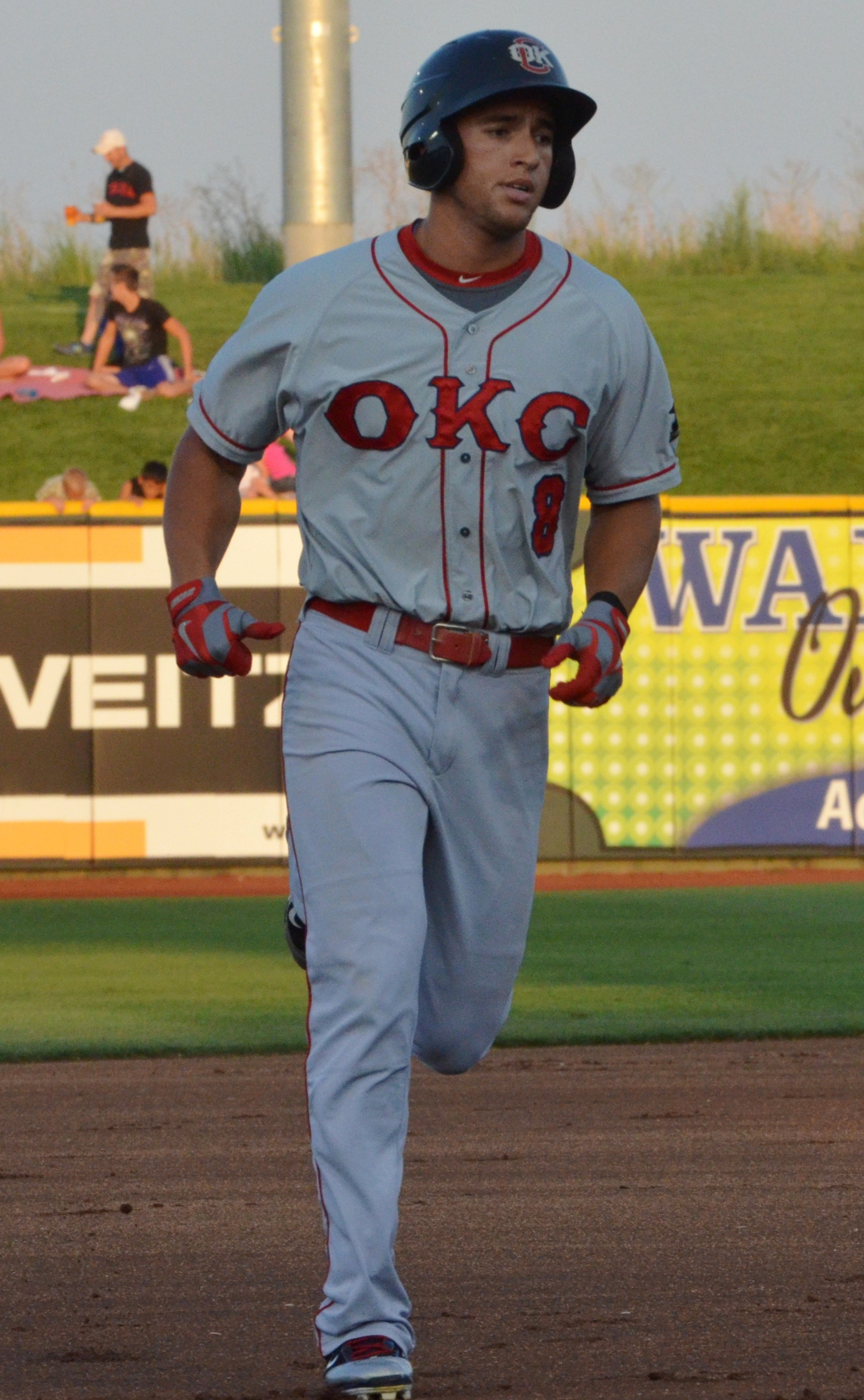 George Springer